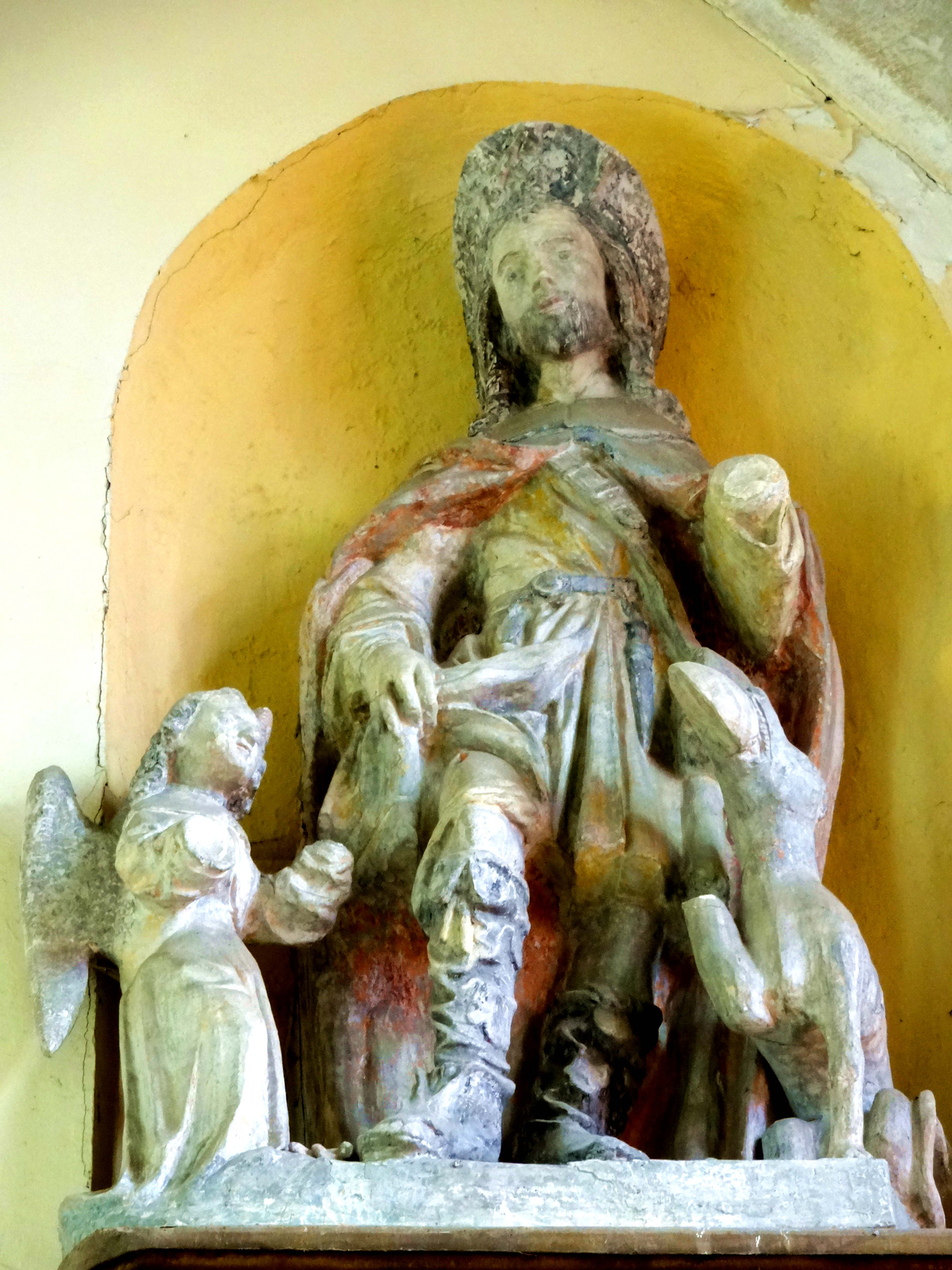 Mobilier de l'église - voir titre.